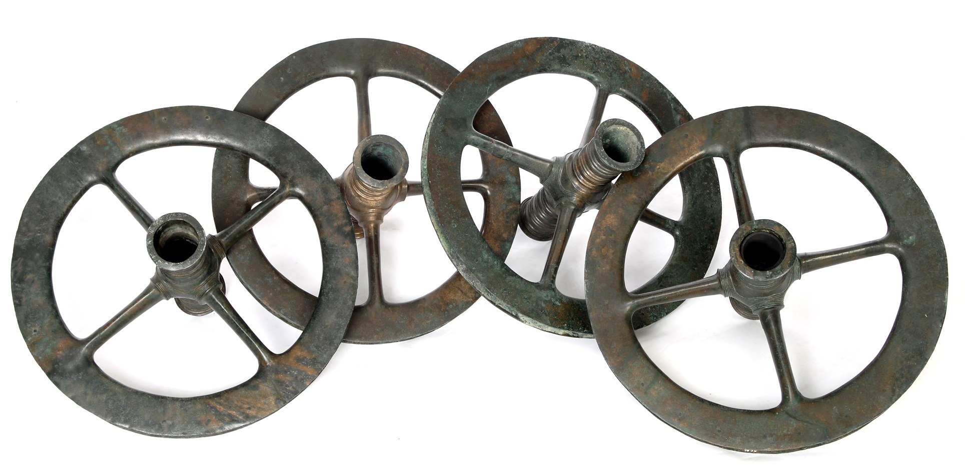 Bronzeräder, Fundort Stade Goebenstraße, um 1000 v. Chr.